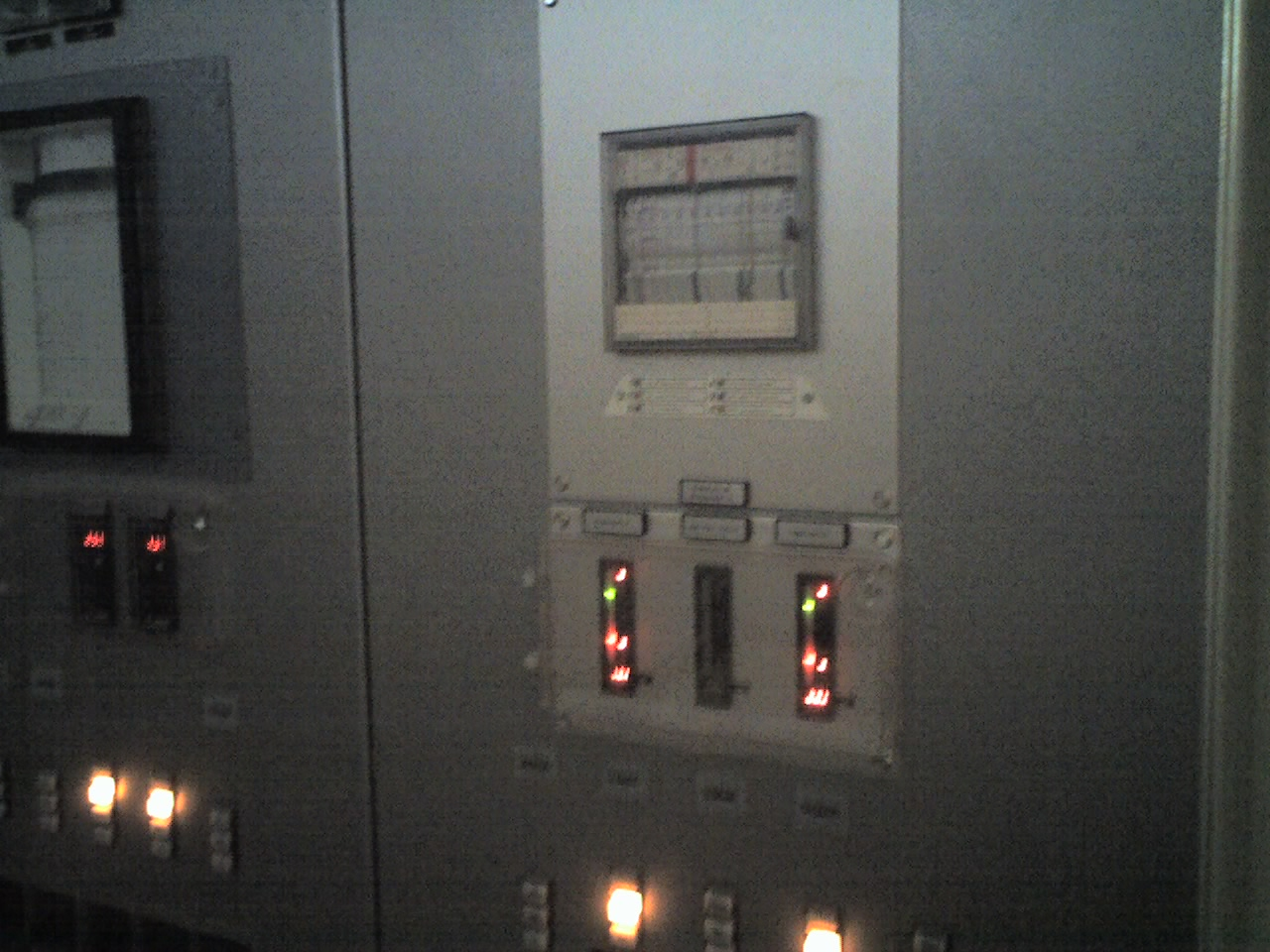 Leittechnikstand zweier Flammrohrrauschrohrkessel